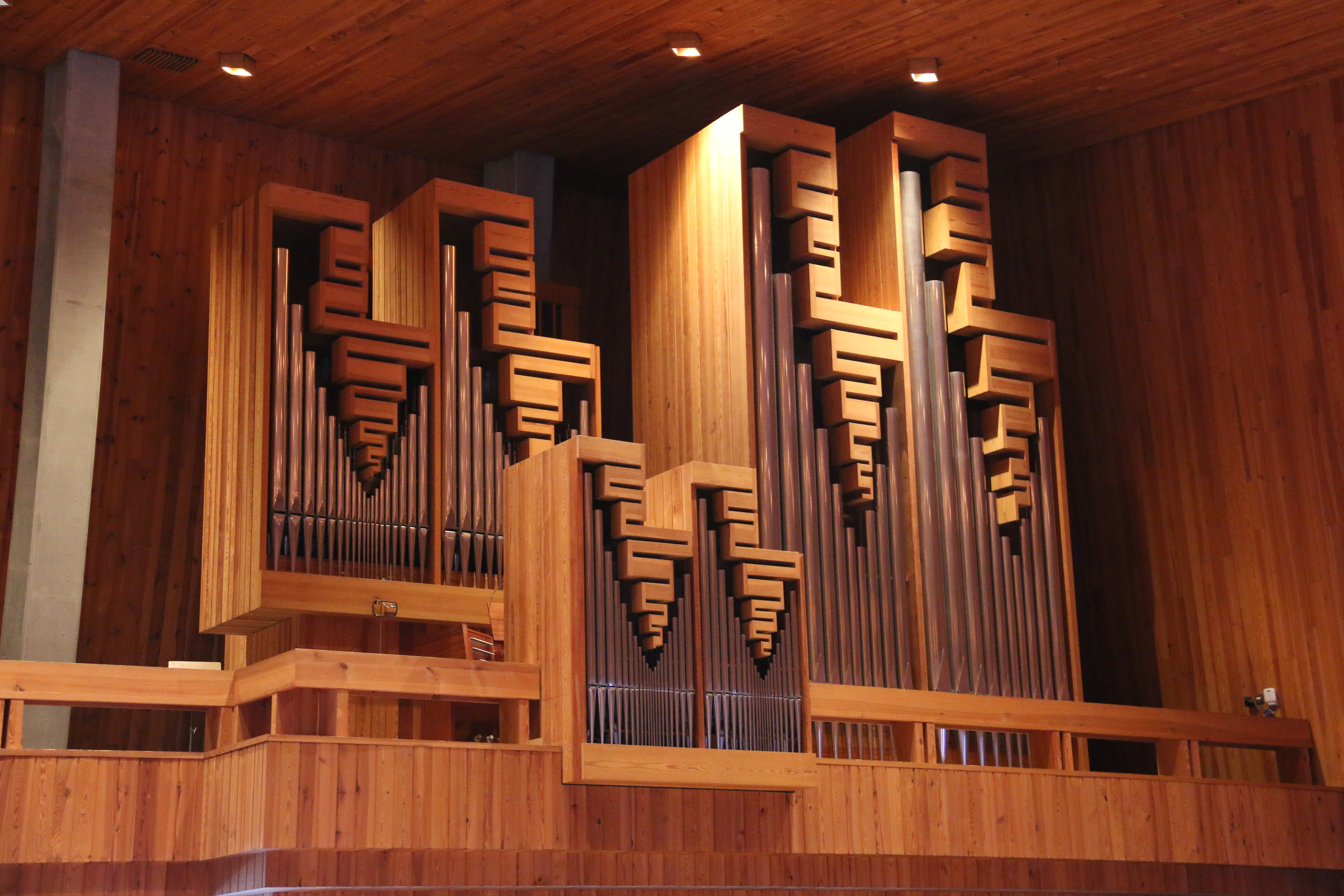 Orgel, die in der Thomaskirche in Liebefeld (CH) steht.